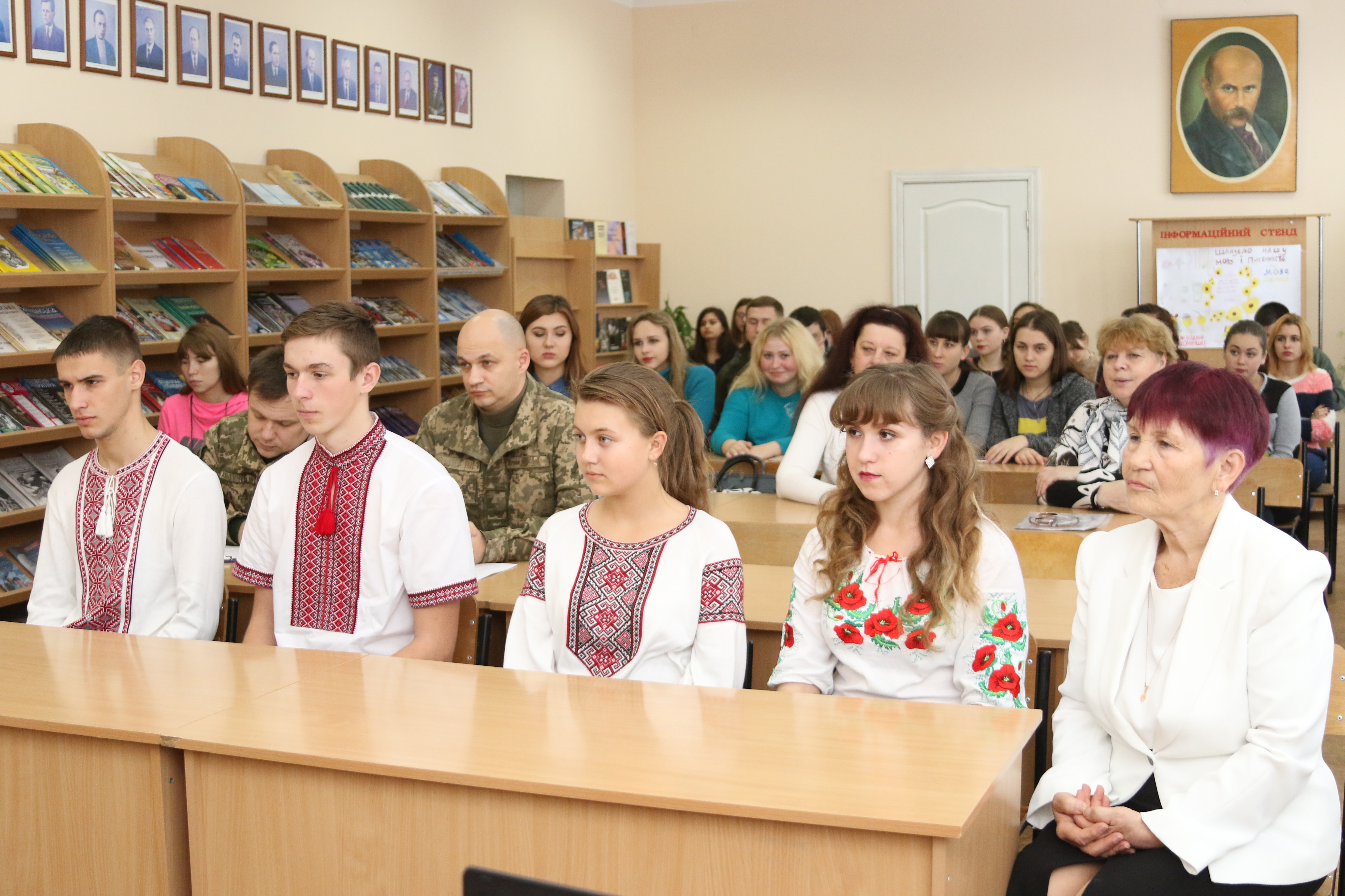 У ЛНУ імені Тараса Шевченка відбулася Всеукраїнська конференція "Слобожанська беседа"